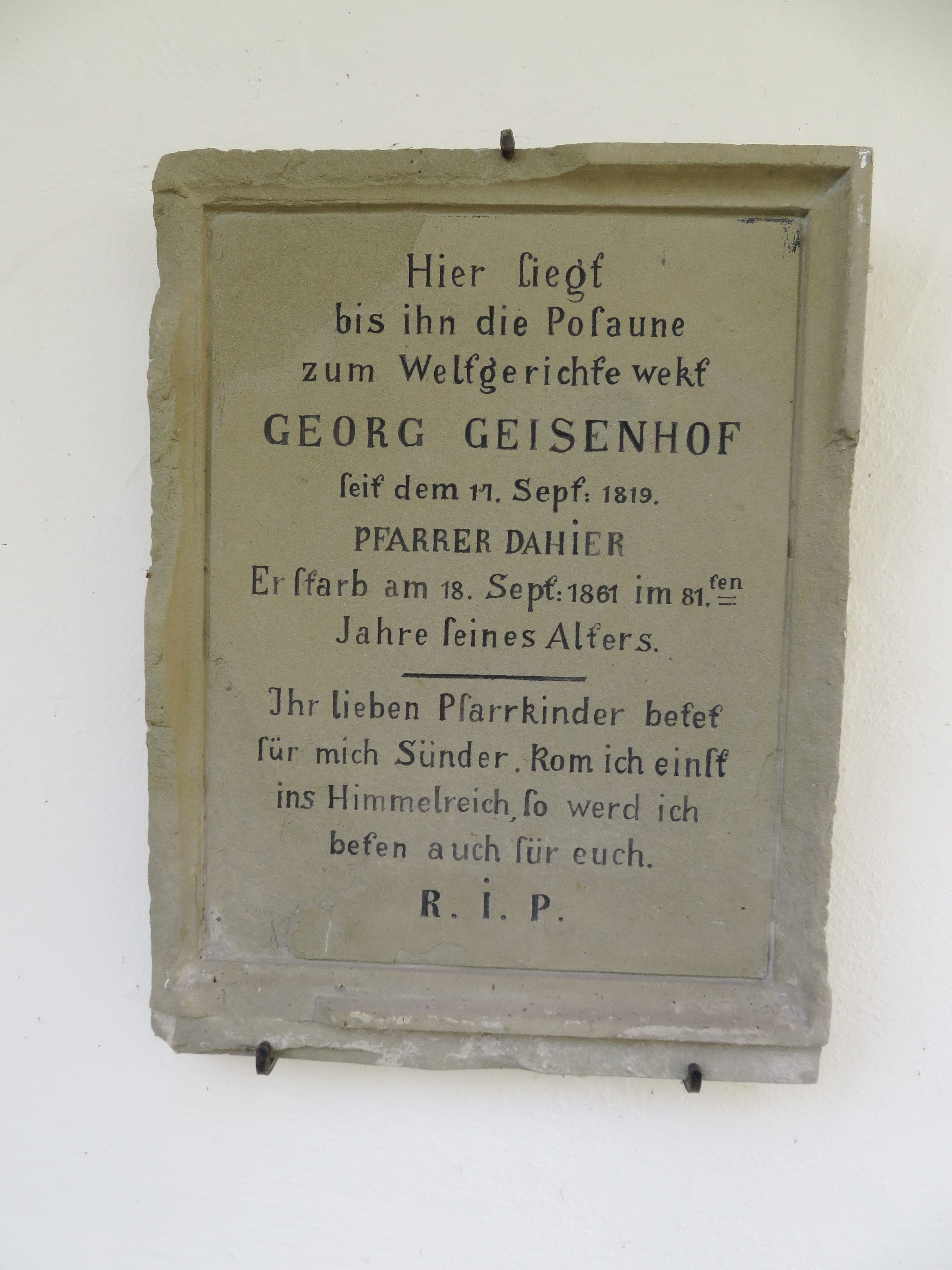 Gedenktafel für Pfarrer Georg Geisenhof an der nördl. Außenwand der kath. Pfarrkirche St. Martin Unterkirchberg